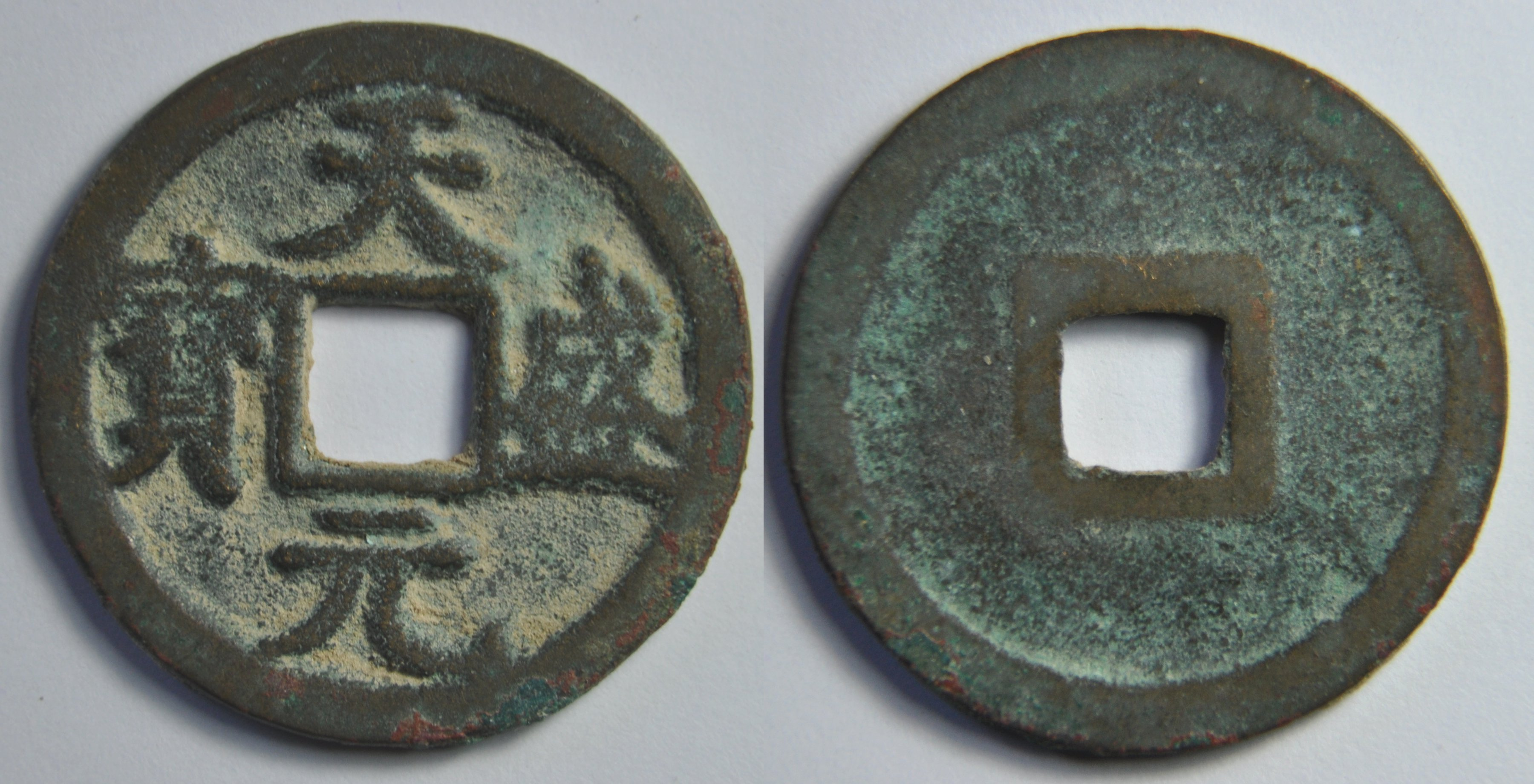 Une monnaie en bronze d'une sapèque de l'empereur Renzong (1139-1193) de la dynastie des Xixia ou Xia occidentaux. Il ne s'agit pas d'un royaume chinois mais d'un empire tangoute appelé Minyak par les Tibétains et qui se situait dans les provinces actuelles du Gansu, Shaanxi et Ningxia. Cet empire a existé de 1032 à 1227. A cette dernière date, il se soumet à Genghis Khan. L'ère Tian Sheng va de 1149 à 1169 et est suivie de l'ère Qian You de 1170 à 1193. A/ Tian Sheng yuan bao (lecture circulaire dans le sens des aiguilles d'une montre en partant du haut) R/ Vide Dimension : 24 mm Poids : 3.6 g. Référence : H18.97 Indice de rareté : 11 (Commune) (D'après D. Hartill) Remarque : La monnaie est dans un état XF ce qui est peu commun. Il existe une monnaie équivalente en fer. (H18.99)